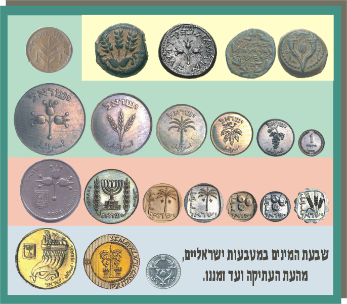 מטבעות ישראליים מכל הזמנים עם הטבעה של פירות שבעת המינים. רישיון נוצר על ידי משתמש:יהודה מלאכי